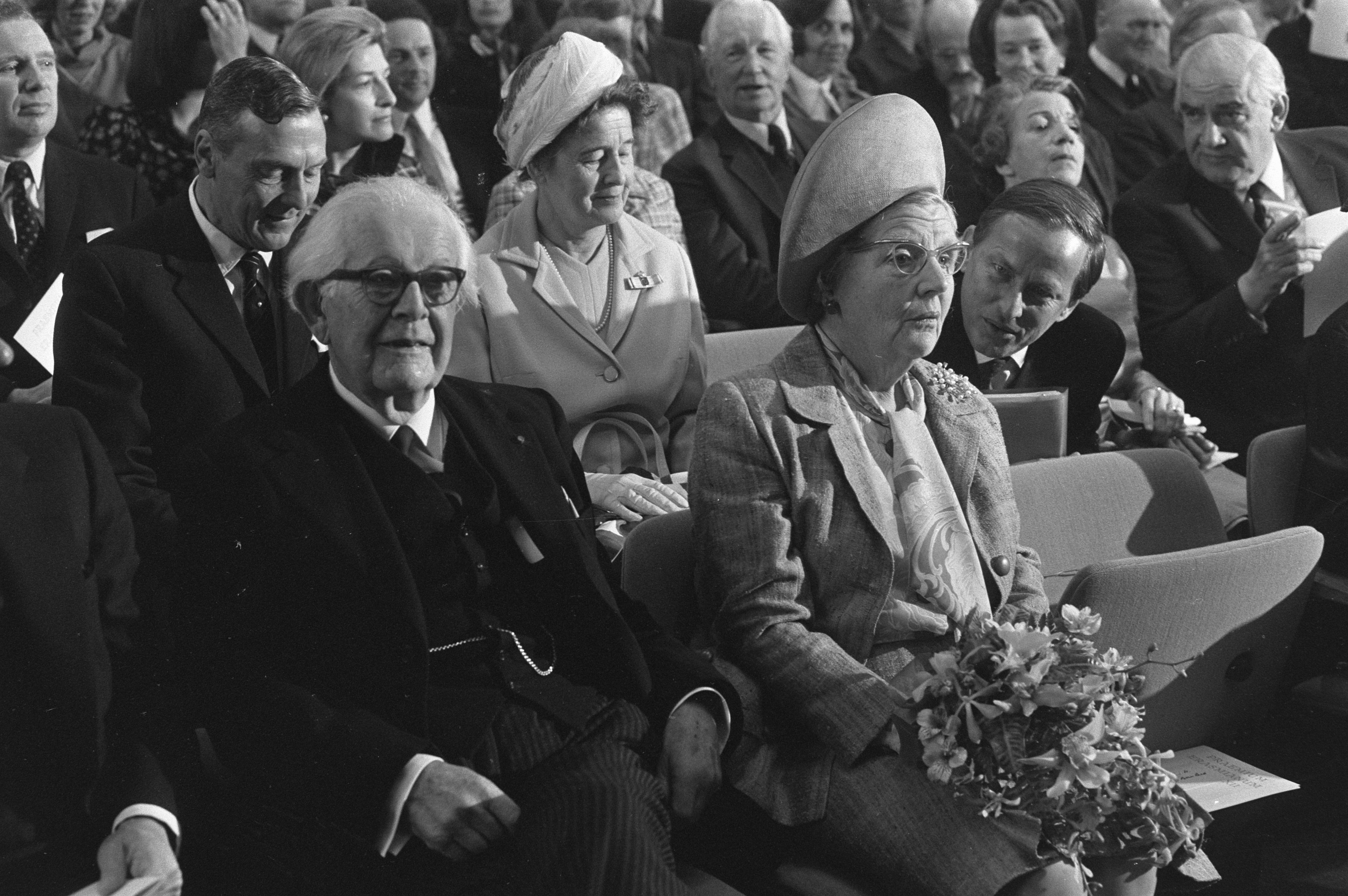 Collectie / Archief : Fotocollectie Anefo Reportage / Serie : Uitreiking van de Erasmusprijs 1972 in de aula van het Koninklijk Instituut voor de Tropen in Amsterdam Beschrijving : Professor Piaget en koningin Juliana tijdens de bijeenkomst Datum : 7 juni 1972 Locatie : Amsterdam, Noord-Holland Trefwoorden : hoogleraren, koninginnen, onderscheidingen, wetenschappelijke prijzen Persoonsnaam : Juliana (koningin Nederland), Piaget, Jean Fotograaf : Bert Verhoeff / Anefo Auteursrechthebbende : Nationaal Archief Materiaalsoort : Negatief (zwart/wit) Nummer archiefinventaris : bekijk toegang 2.24.01.05 Bestanddeelnummer : 925-6521